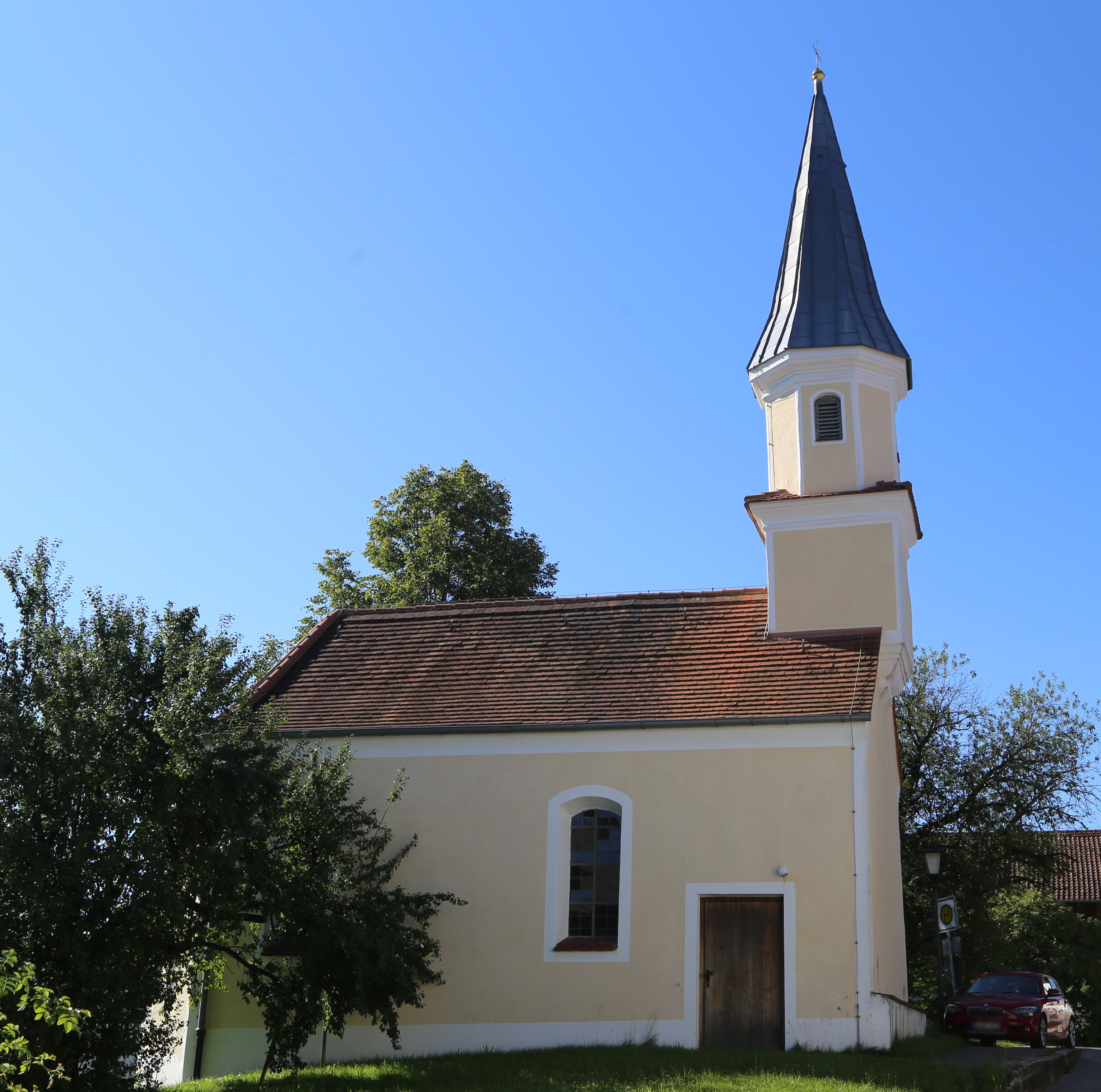 Sindlhausen 21, Tuntenhausen; Filialkirche St. Margaretha, kleiner Saalbau mit Dachreiter, im Kern romanisch, umgebaut 17./18. Jh.; mit Ausstattung.